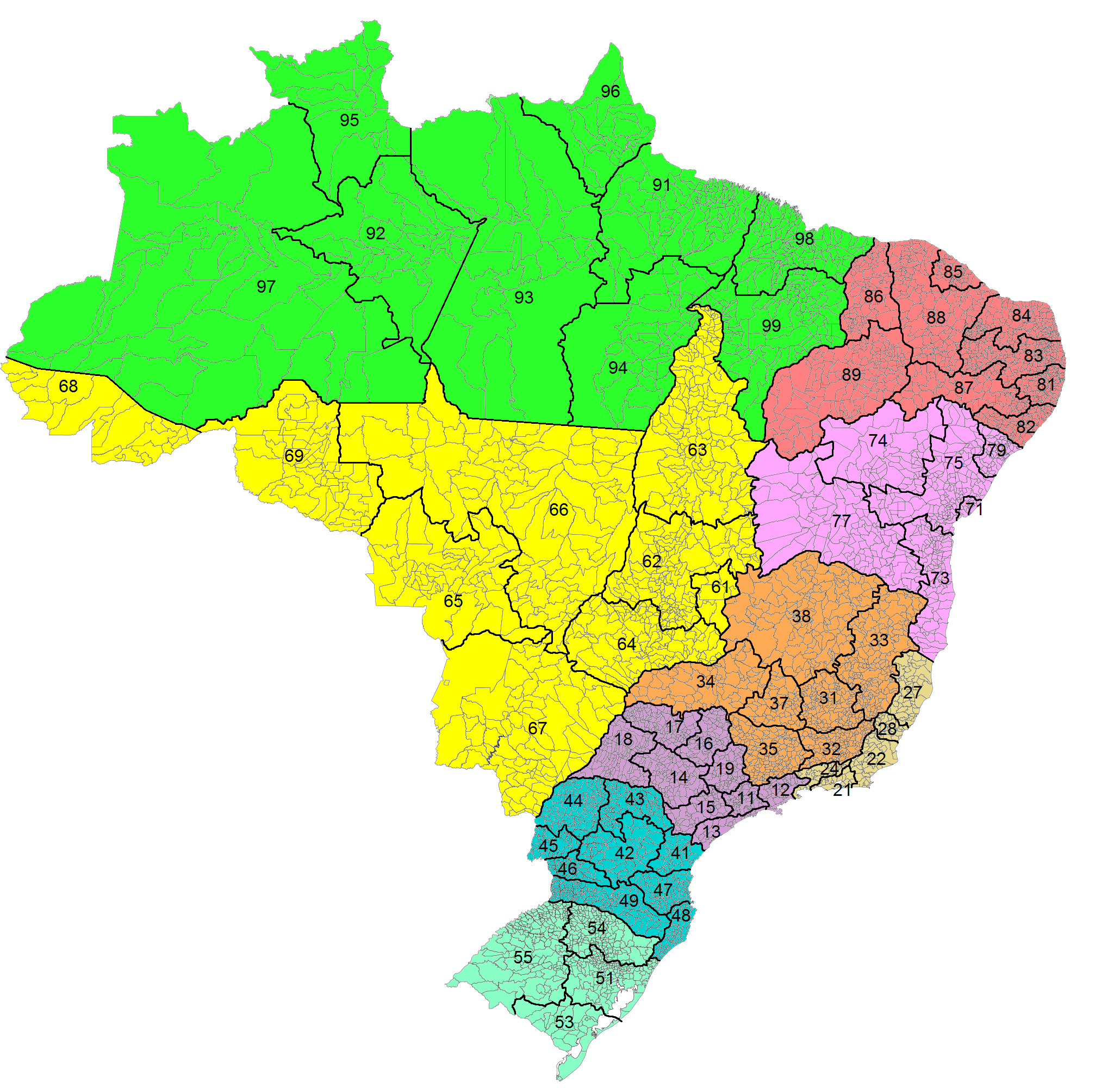 Mapa do Brasil, com estados e municípios, mostrando os códigos de área - DDD